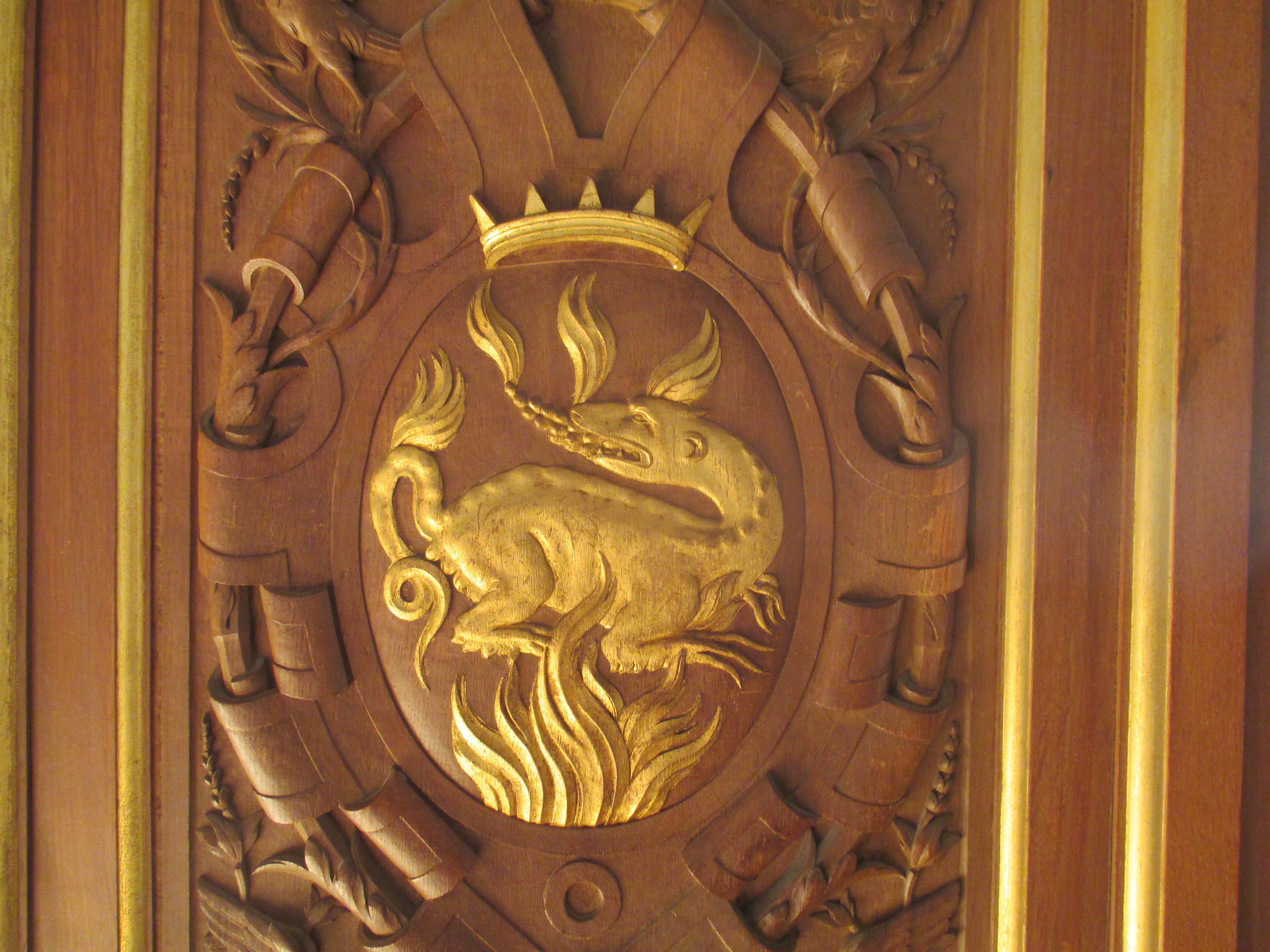 Salamandre de François Ier dans la galerie François Ier du château de Fontainebleau.